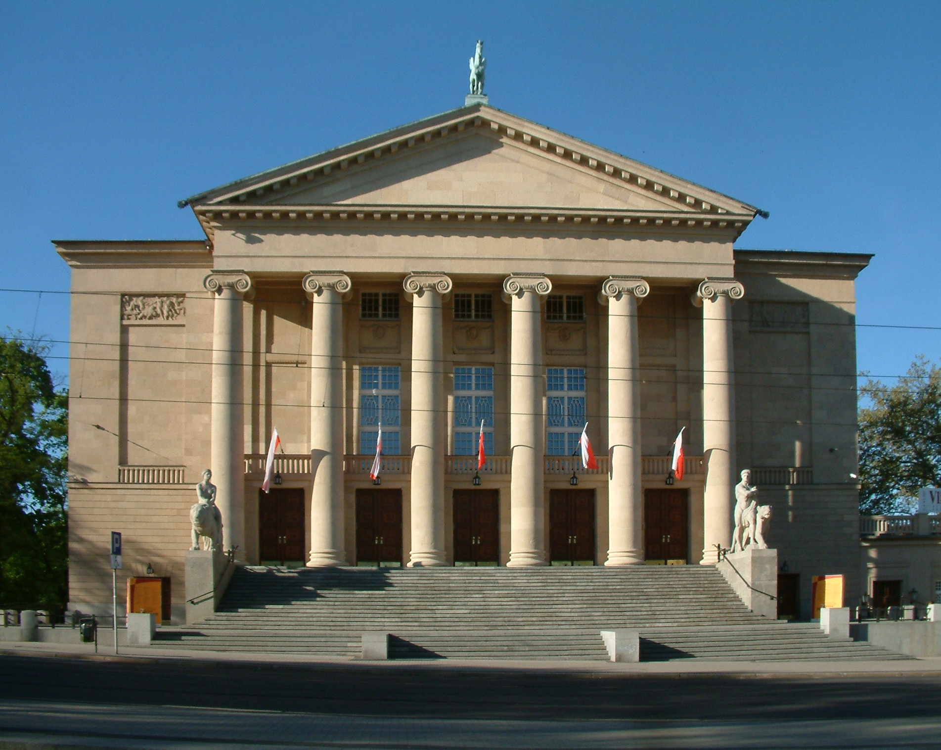 Opera House in Poznań